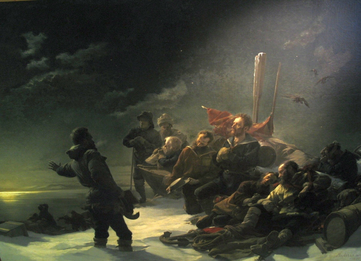 Nie zurück!label QS:Lde,"Nie zurück!"